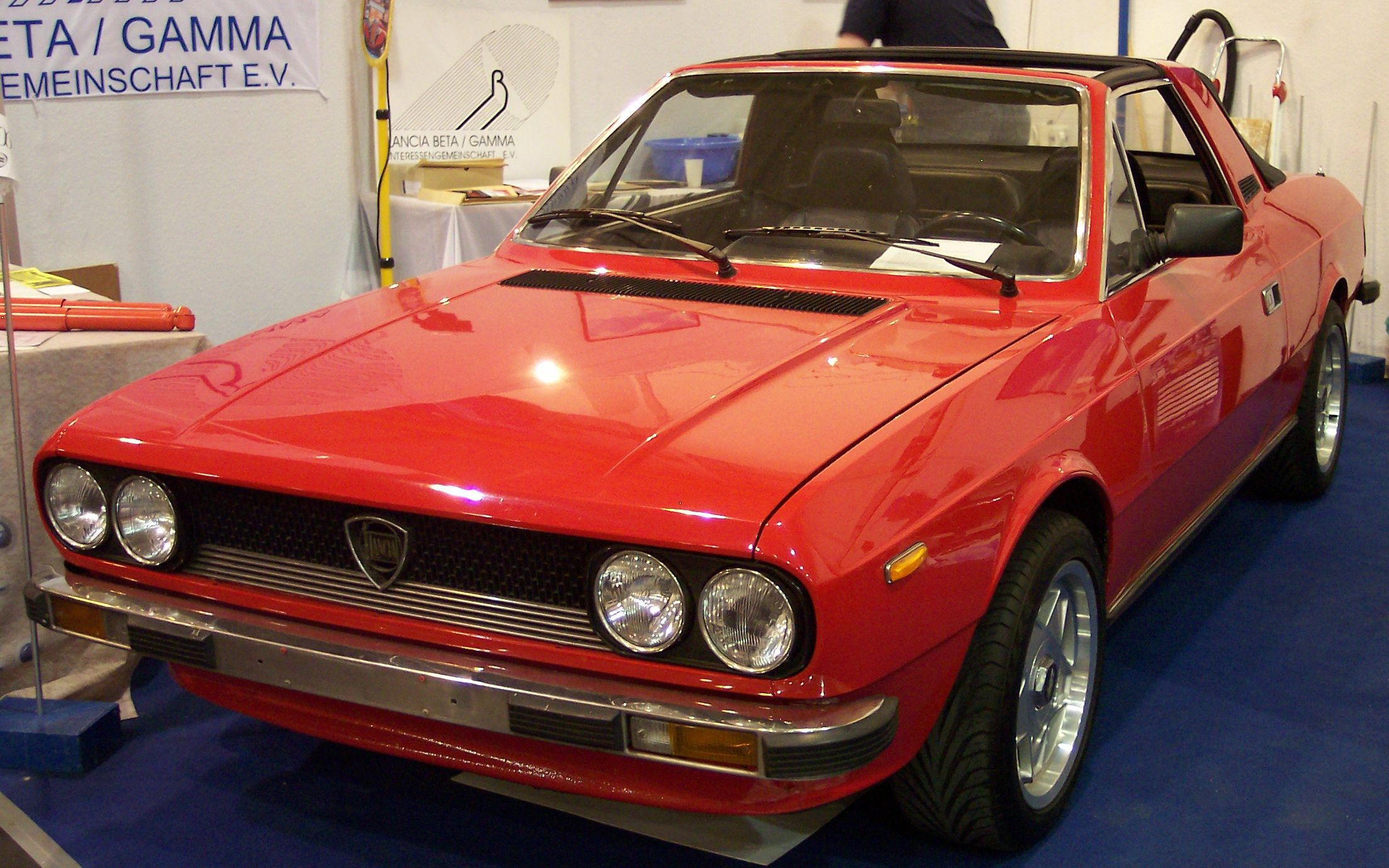 Lancia Beta Spider